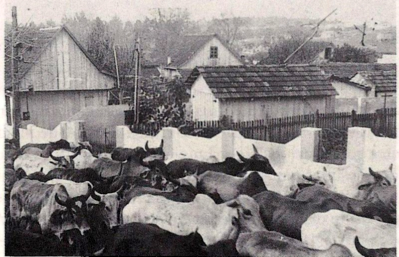 Boiada na estrada para São José dos Pinhais